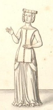 Jeanne de France